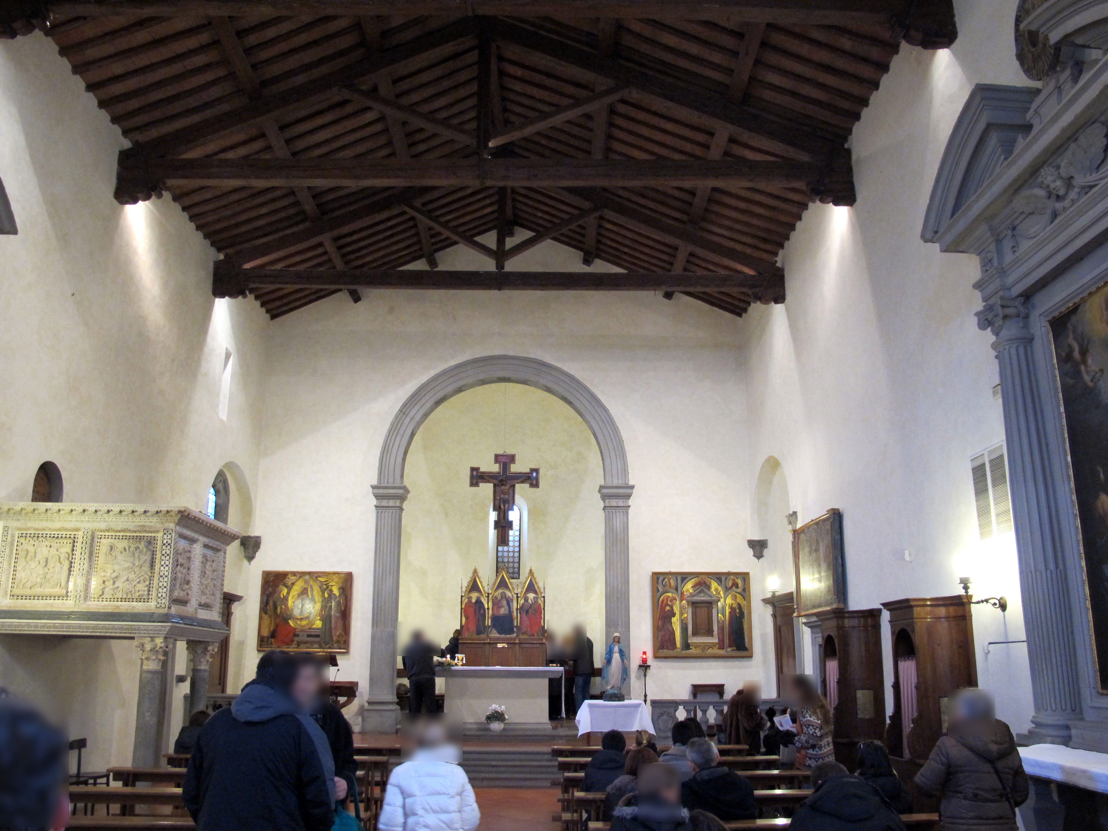 San leonardo in arcetri, interno 01.JPG